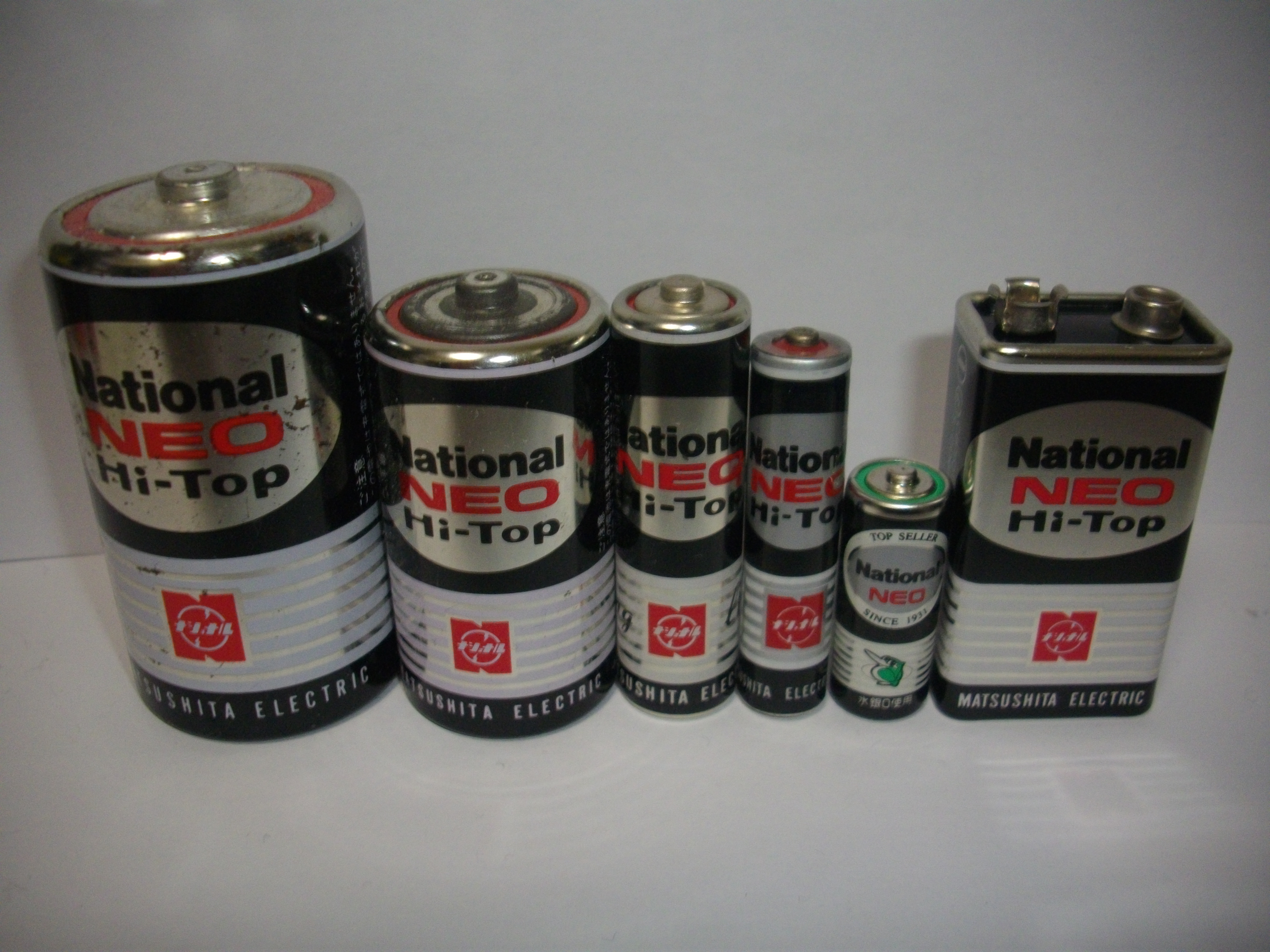 左から単1、単2、単3、単4、単5、6F22（9V）。写真は80年代のナショナルネオハイトップ（黒）電池および90年代のナショナルネオ（黒）である。